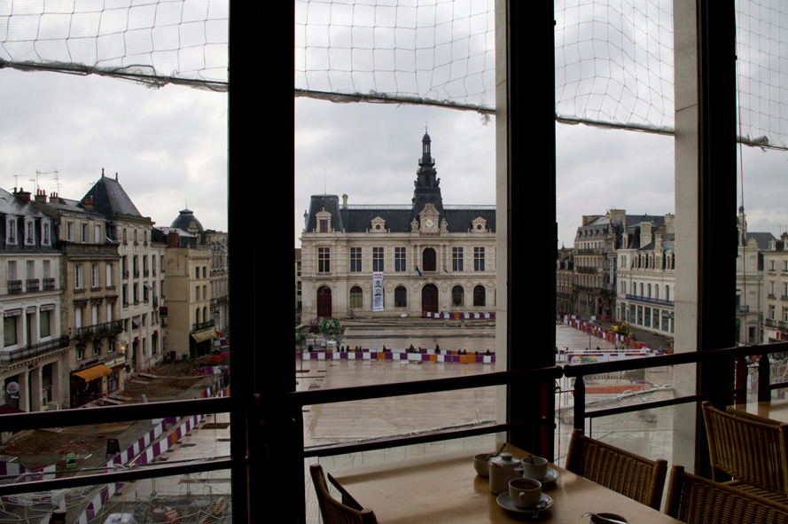 La place du Maréchal-Leclerc et l'hôtel de ville de Poitiers, vues depuis le bâtiment de l'ancien Printemps, durant les travaux de l'opération "Coeur d'Agglo", 2011